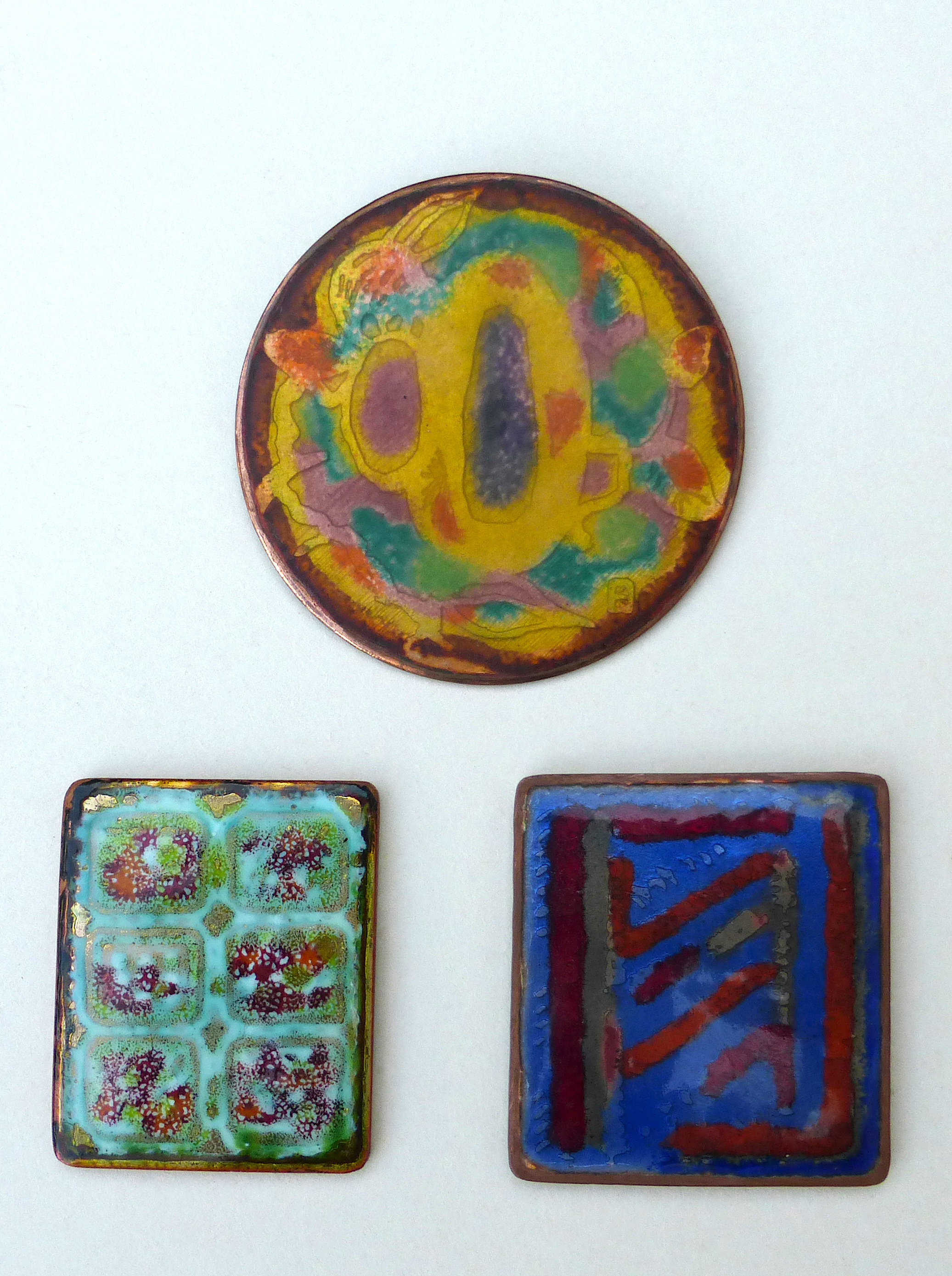 Ensemble d'émaux réalisés par frère Pierre Etienne de la Communauté de Taizé.